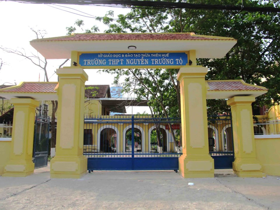 Cổng chính